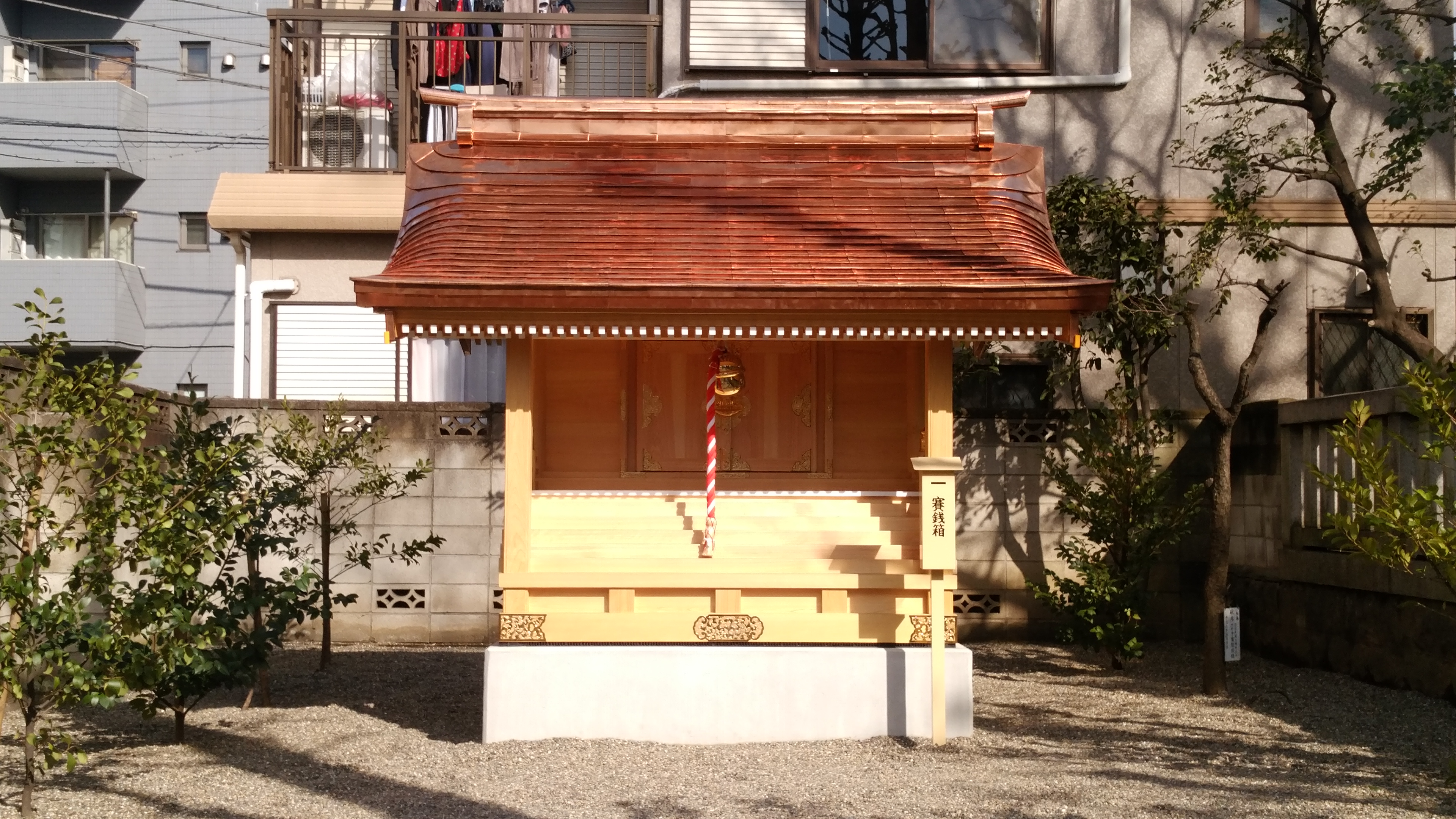 元郷氷川神社の境内末社